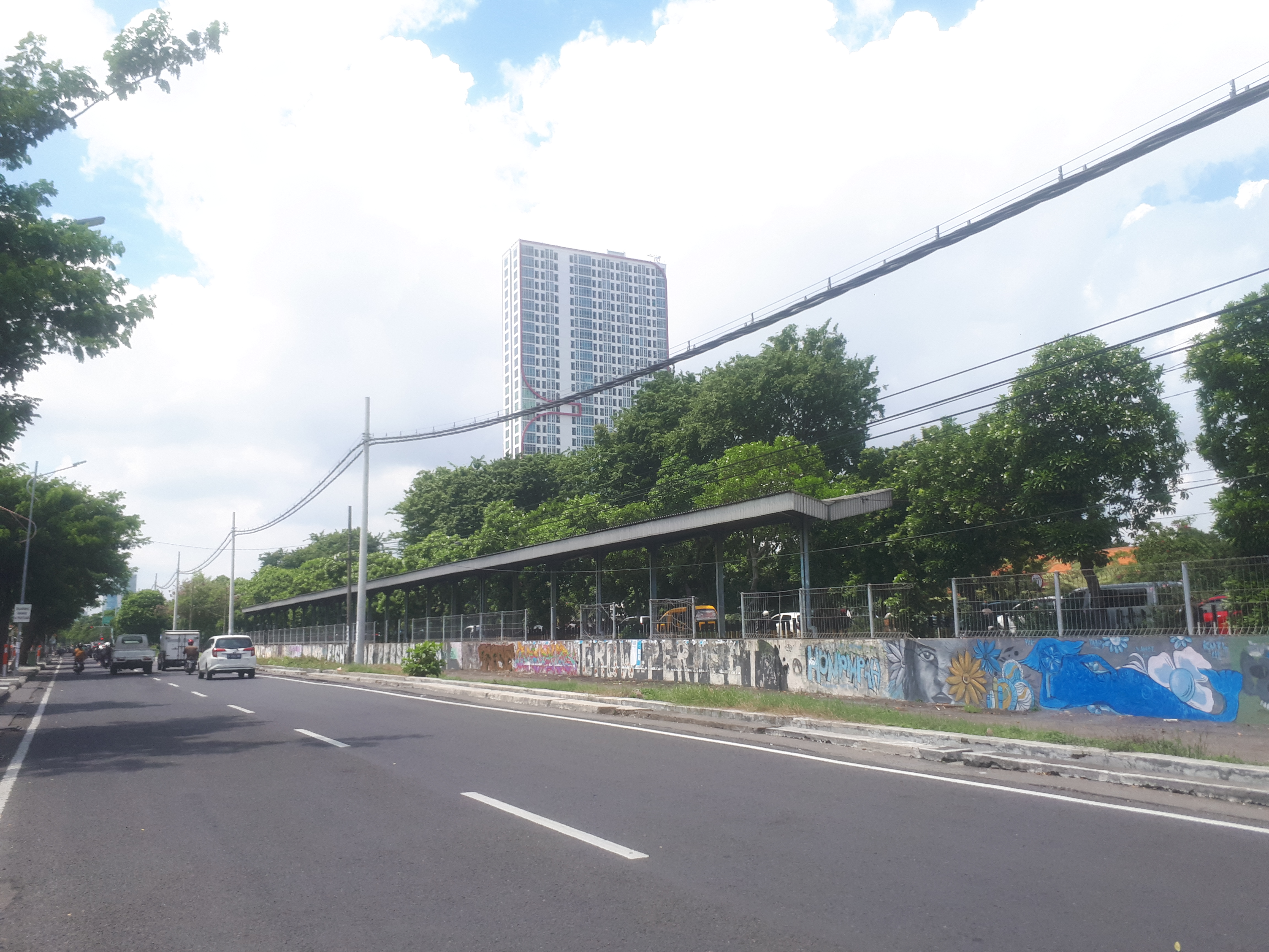 Tampak luar Halte Jemursari tahun 2020